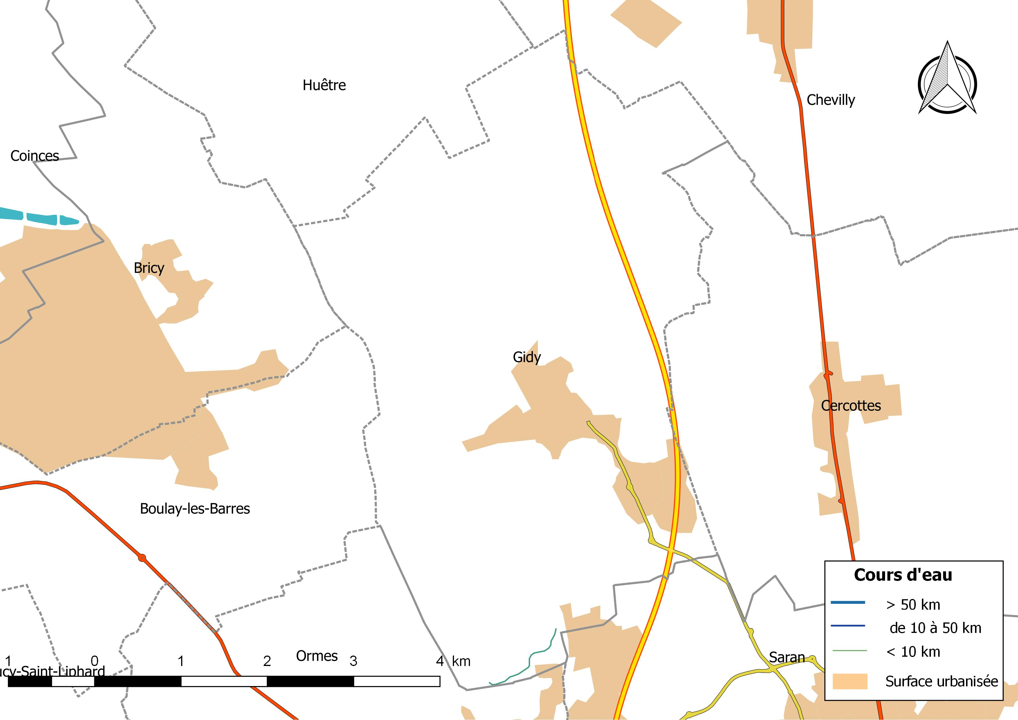 Carte du réseau hydrographique de la commune de Gidy (France).